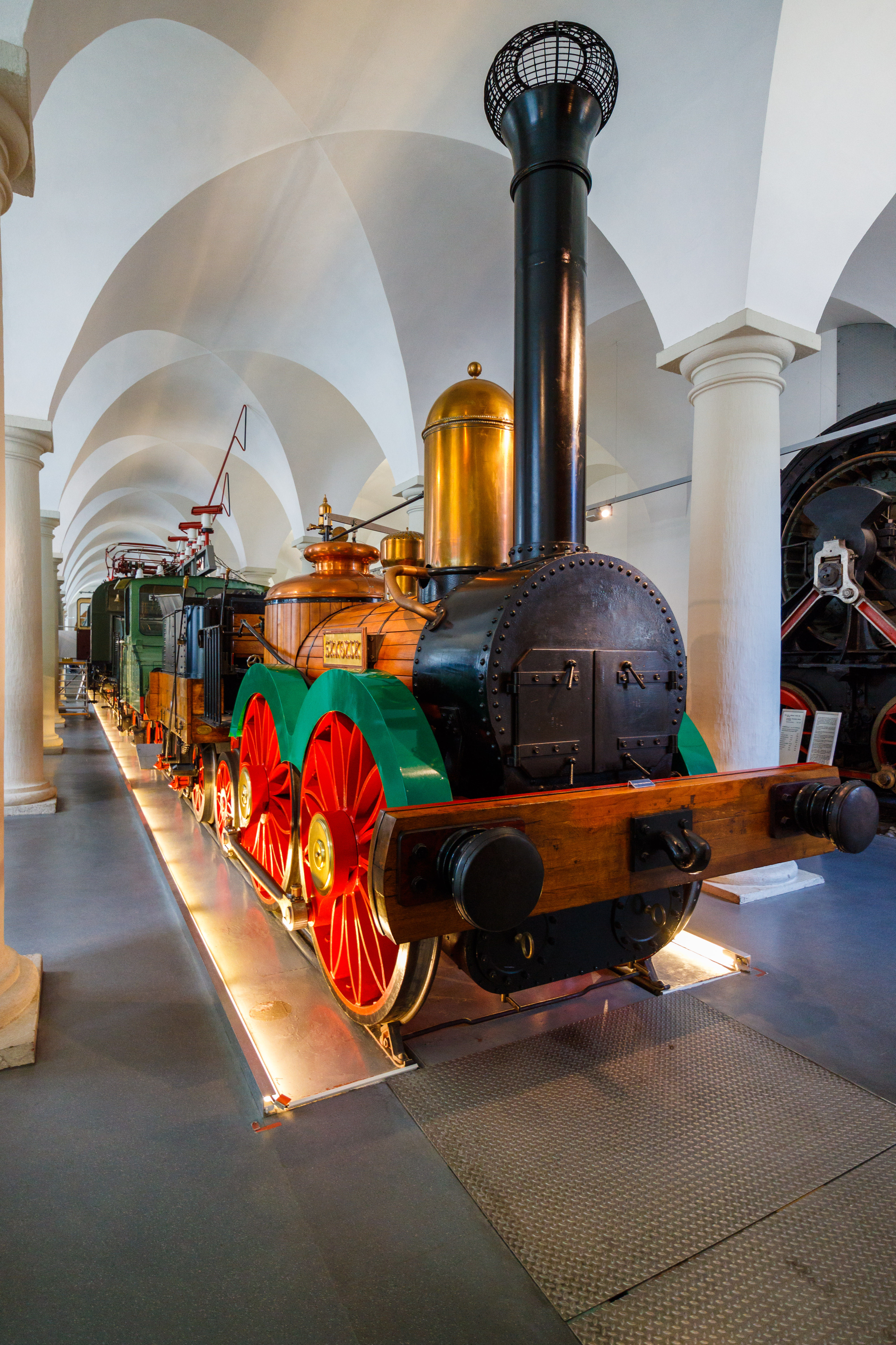 Die Lokomotive SAXONIA der Leipzig-Dresdner Eisenbahn-Compagnie